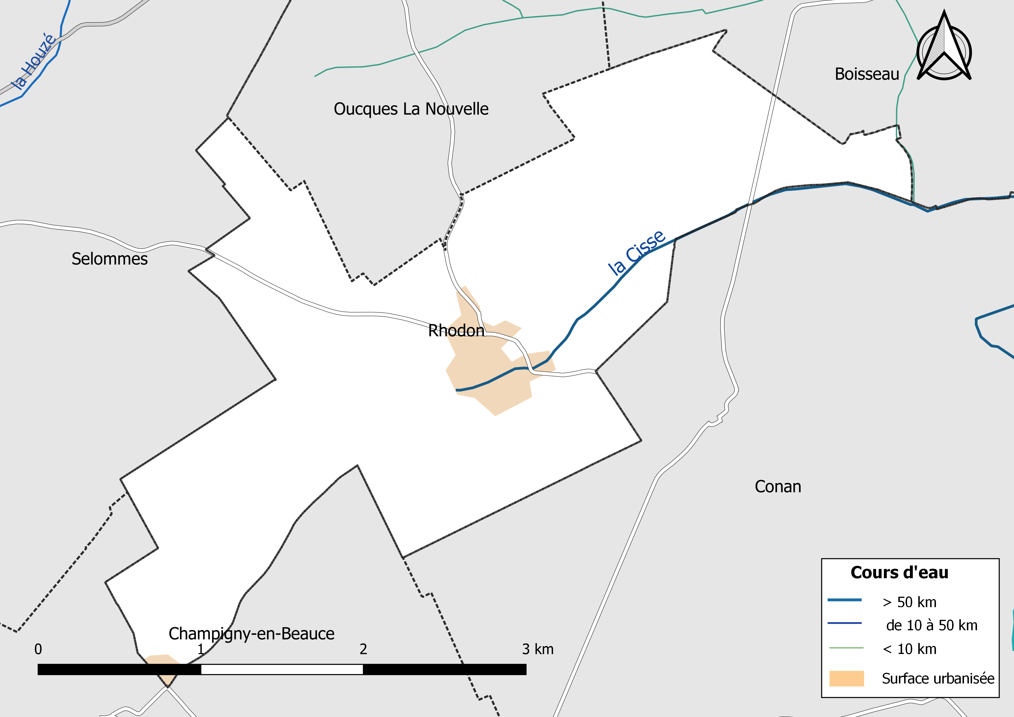 Carte du réseau hydrographique de la commune de Rhodon (Loir-et-Cher) (France).